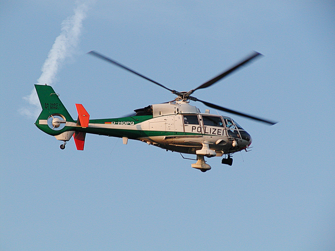 Ein Polizei Hubschrauber im Einsatz über Hannover